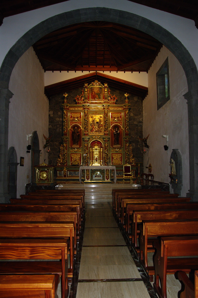 Altar in Klosterkirche in Pedro Vilaflor, Teneriffa